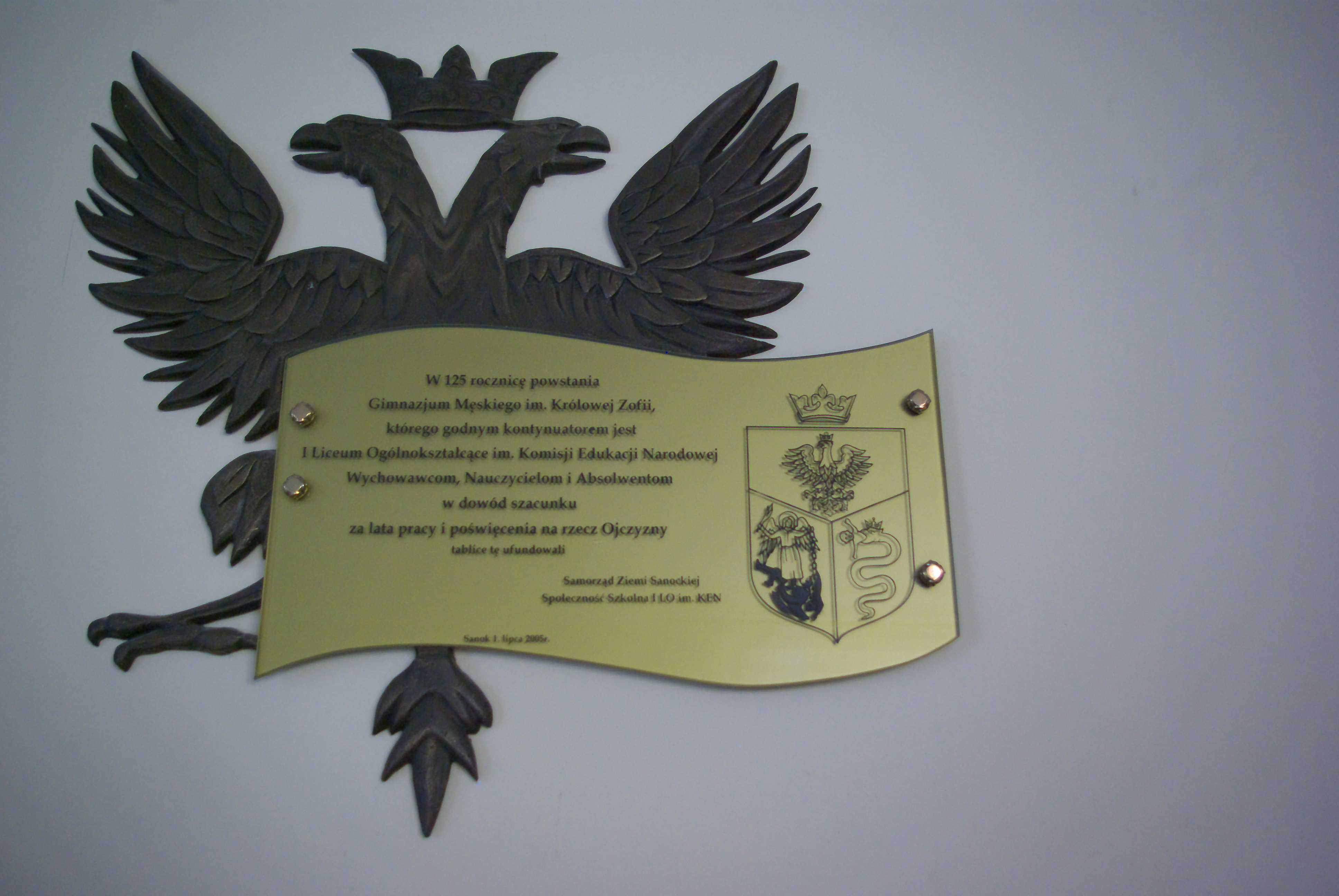 I Liceum Ogólnokształcące im. Komisji Edukacji Narodowej w Sanoku, tablica pamiątkowa 2005